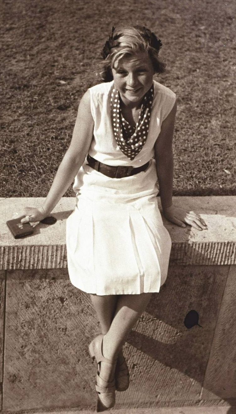 Inge Sørensen